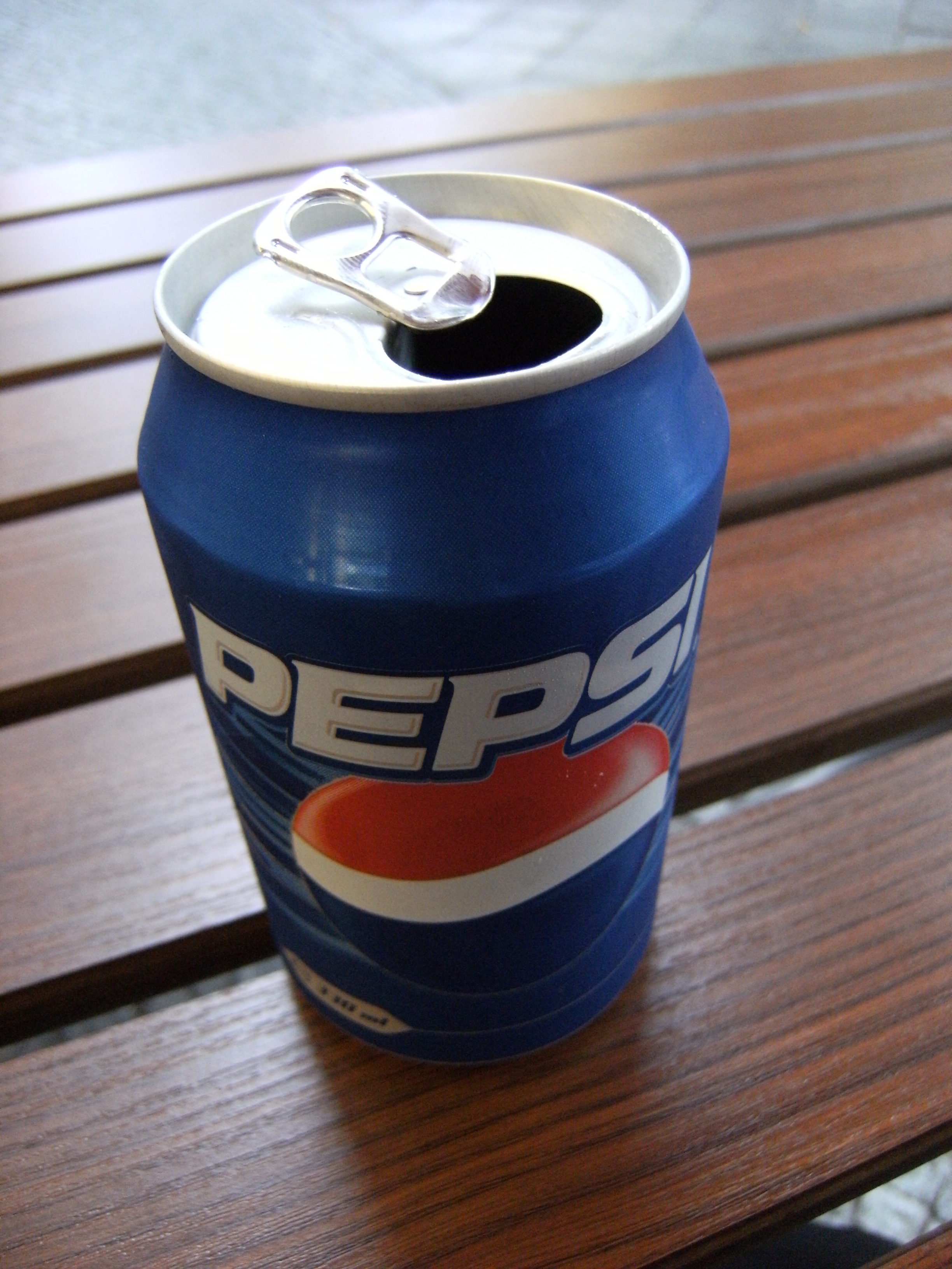 Pepsi Cola 2008, Deustchland.